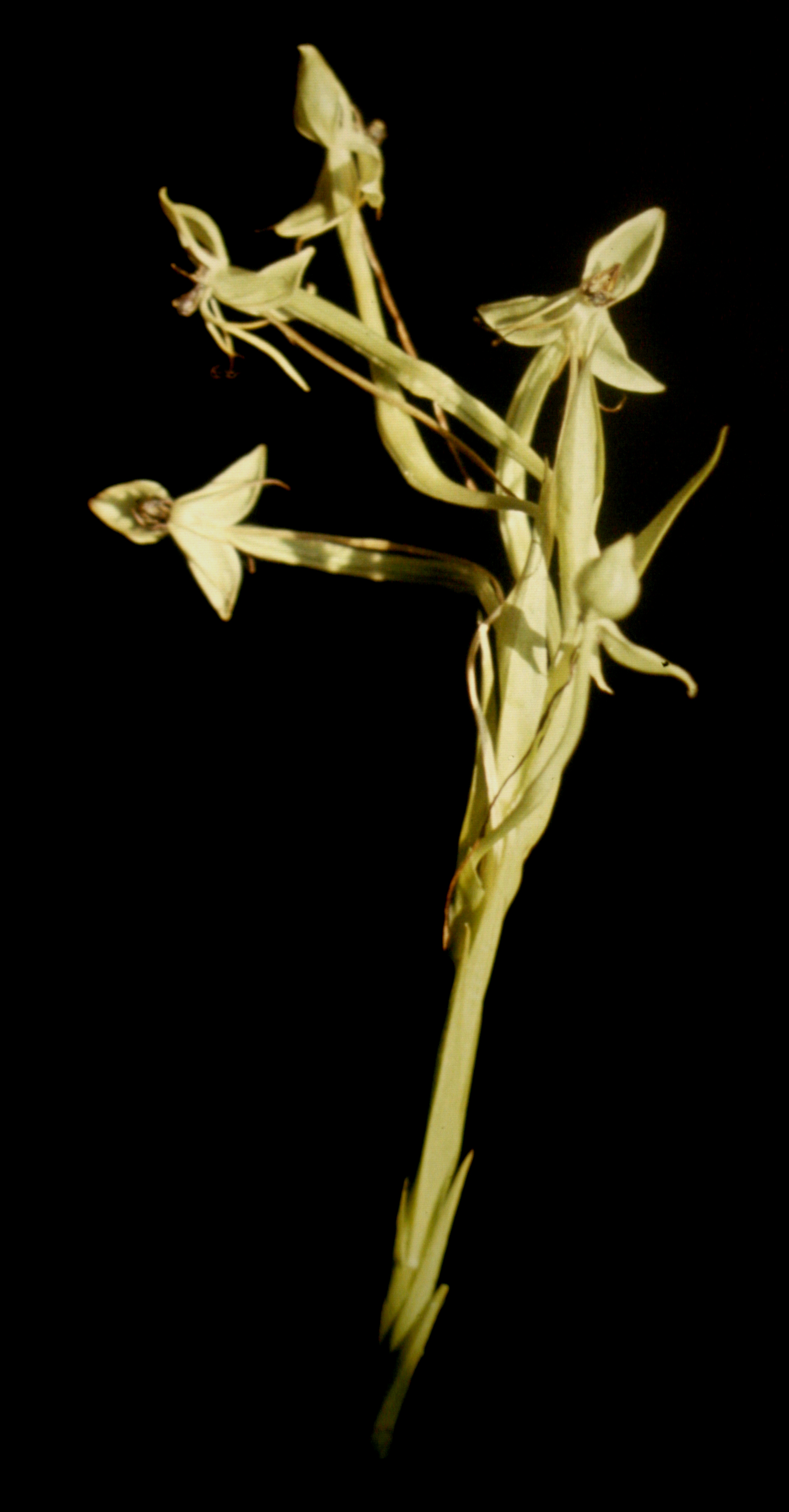 Habenaria longicauda. Suriname.